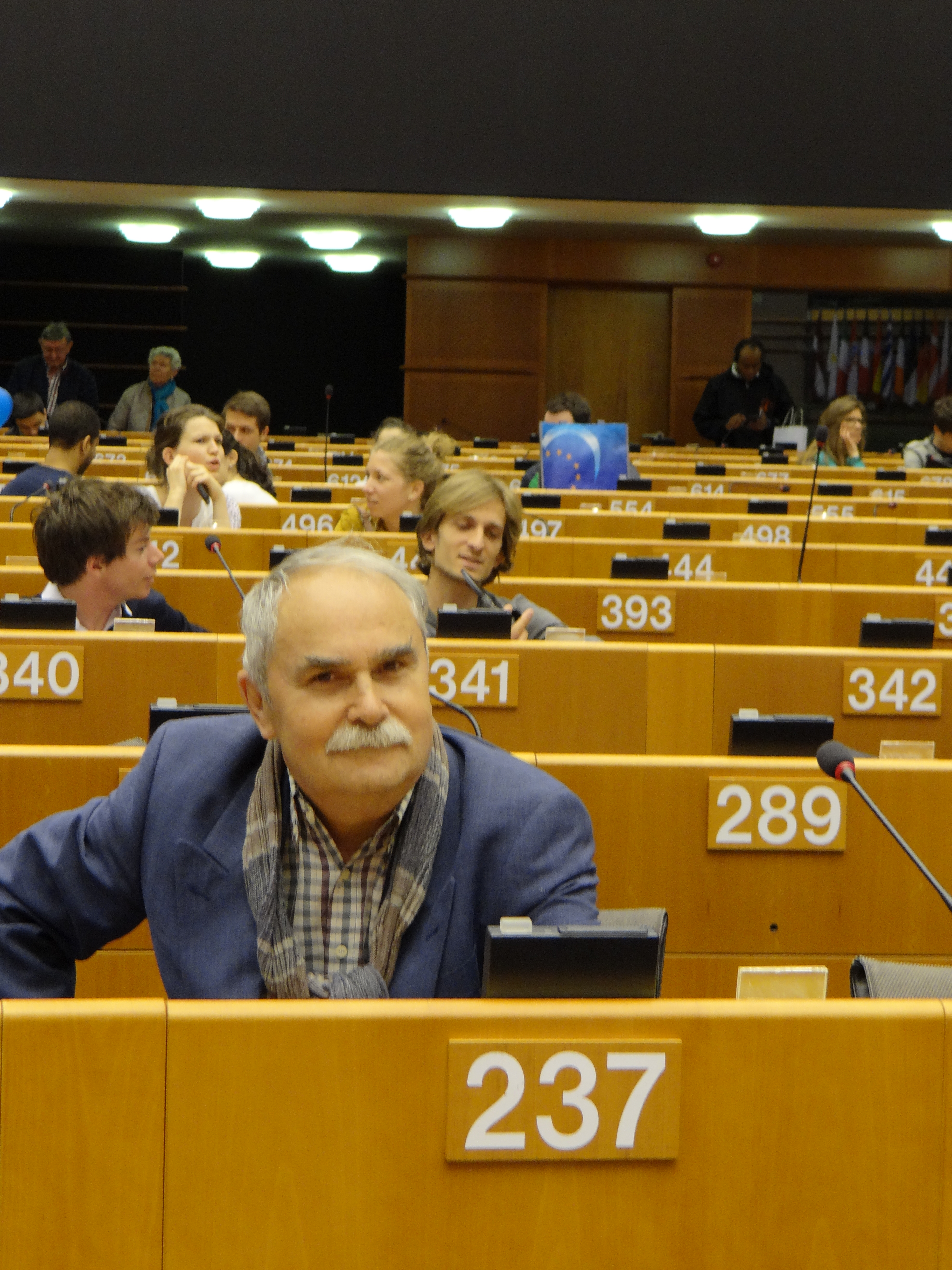 W Parlamencie Europejskim